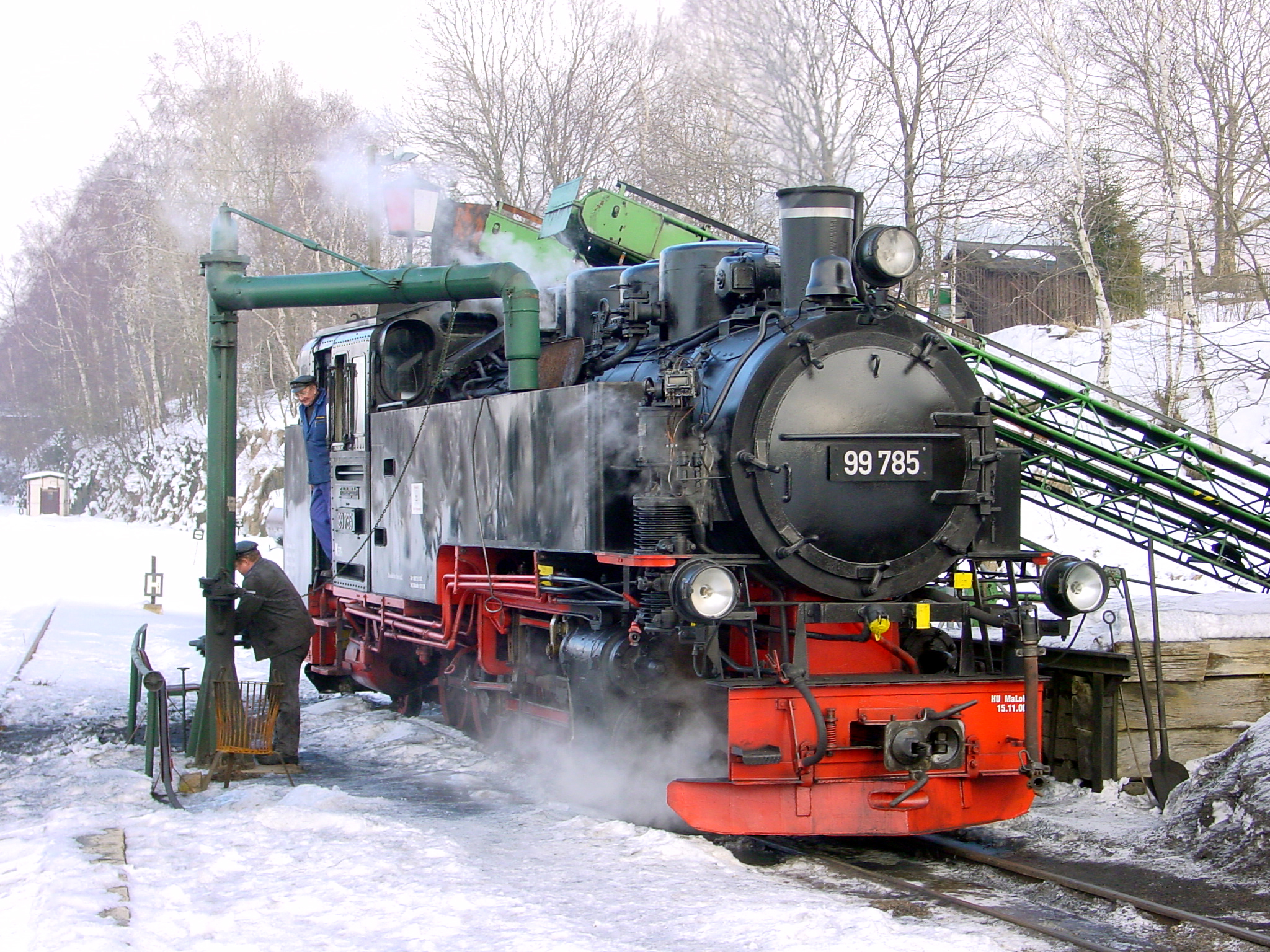 Dampflokomotive 99 785 an den Lokbehandlungsanlagen im Bf. Cranzahl 22.02.2003 (foto by geme)